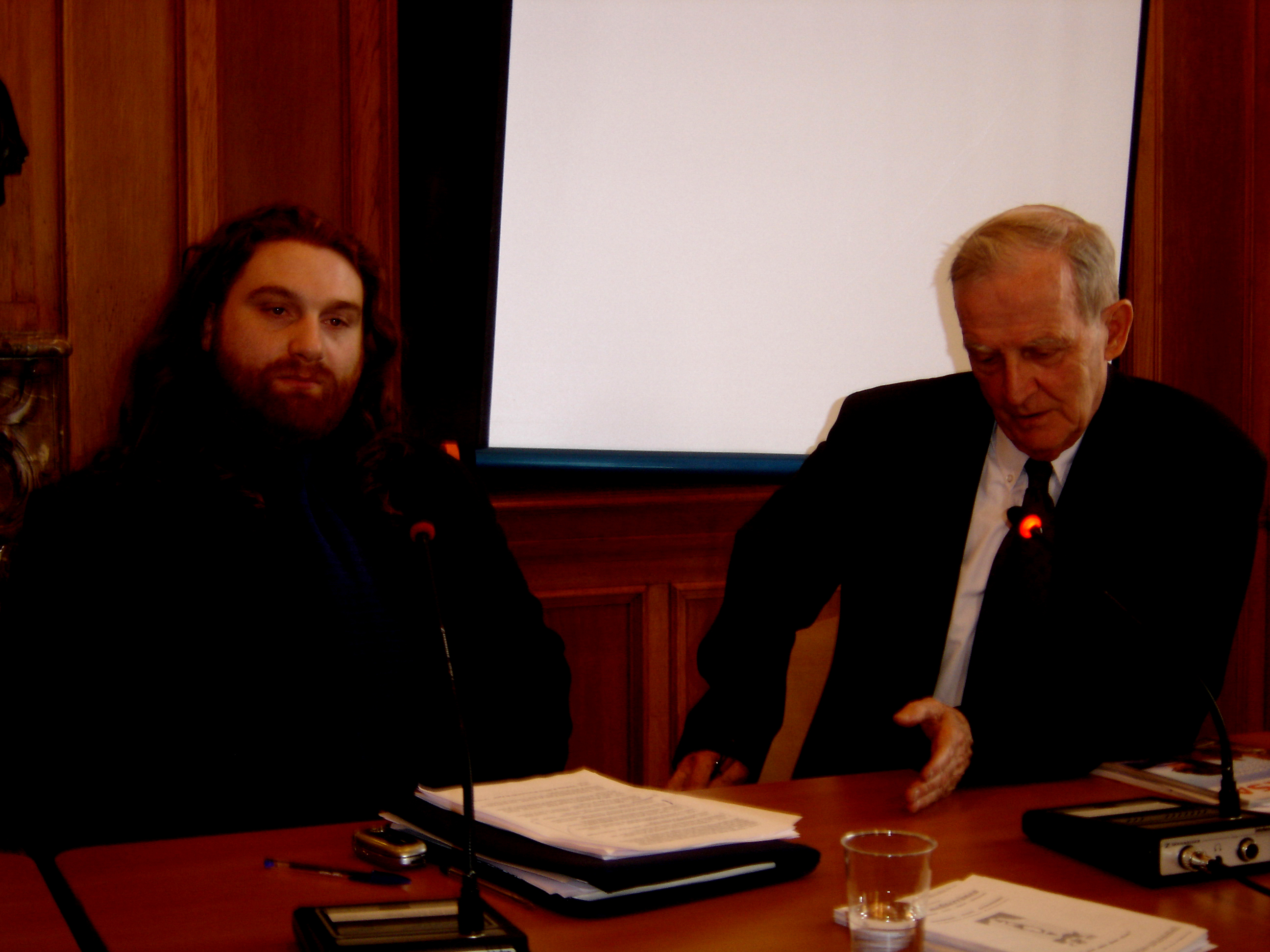 Après une intervention commune au Palais du Luxembourg, sur le thème de la diversité culturelle, le cinéaste Magà Ettori (Institut Régional du Cinéma et de l'Audiovisuel Corse - IRCA) et le Docteur Edmond Simeoni (Corsica Diaspora) ont été invités à un débat public à la mairie du 5eme arrondissement de Paris.